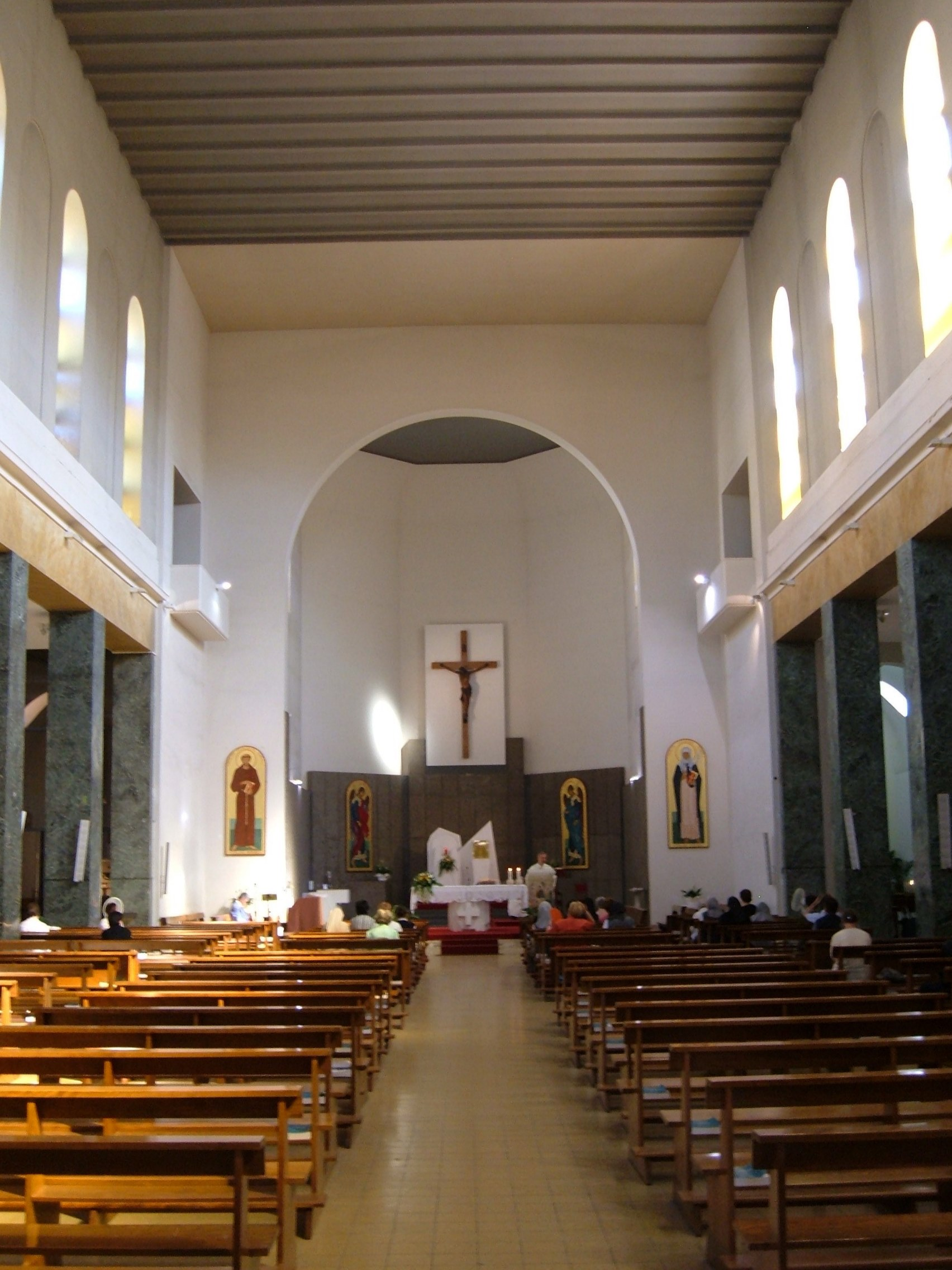 Chiesa di San Francesco d'Assisi e Santa Caterina da Siena, Patroni d'Italia, a Roma, nel quartiere Gianicolense.